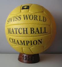 balon mundial 1954